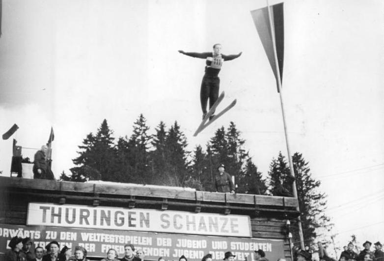 Illus Seidel 16.2.51 Die 2. Wintersportmeisterschaften der Deutschen Demokratischen Republik vom 11.-18.2.51 in Oberhof UBz: An der "Thüringer Schanze". G. Richter aus Bärenstein beim Sprung.